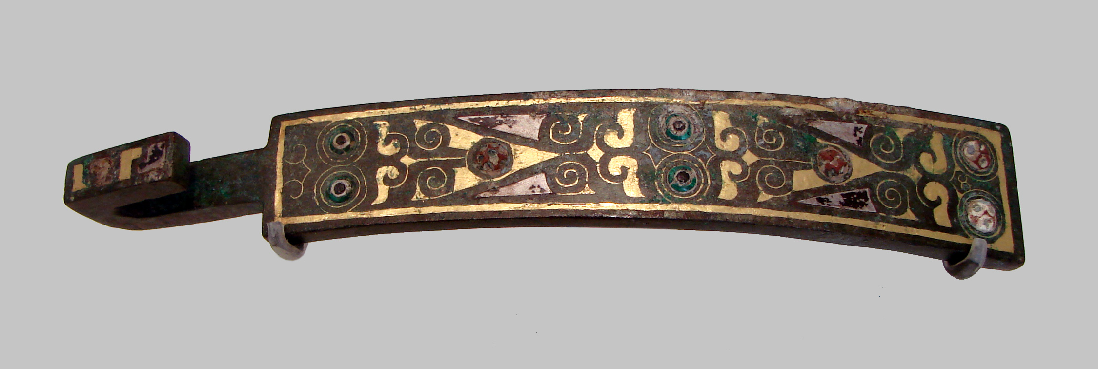 Agrafe. Epoque des Royaumes Combattants ou Dynastie Han, 4ème-3ème siècle - JC. Musée Guimet, Paris.